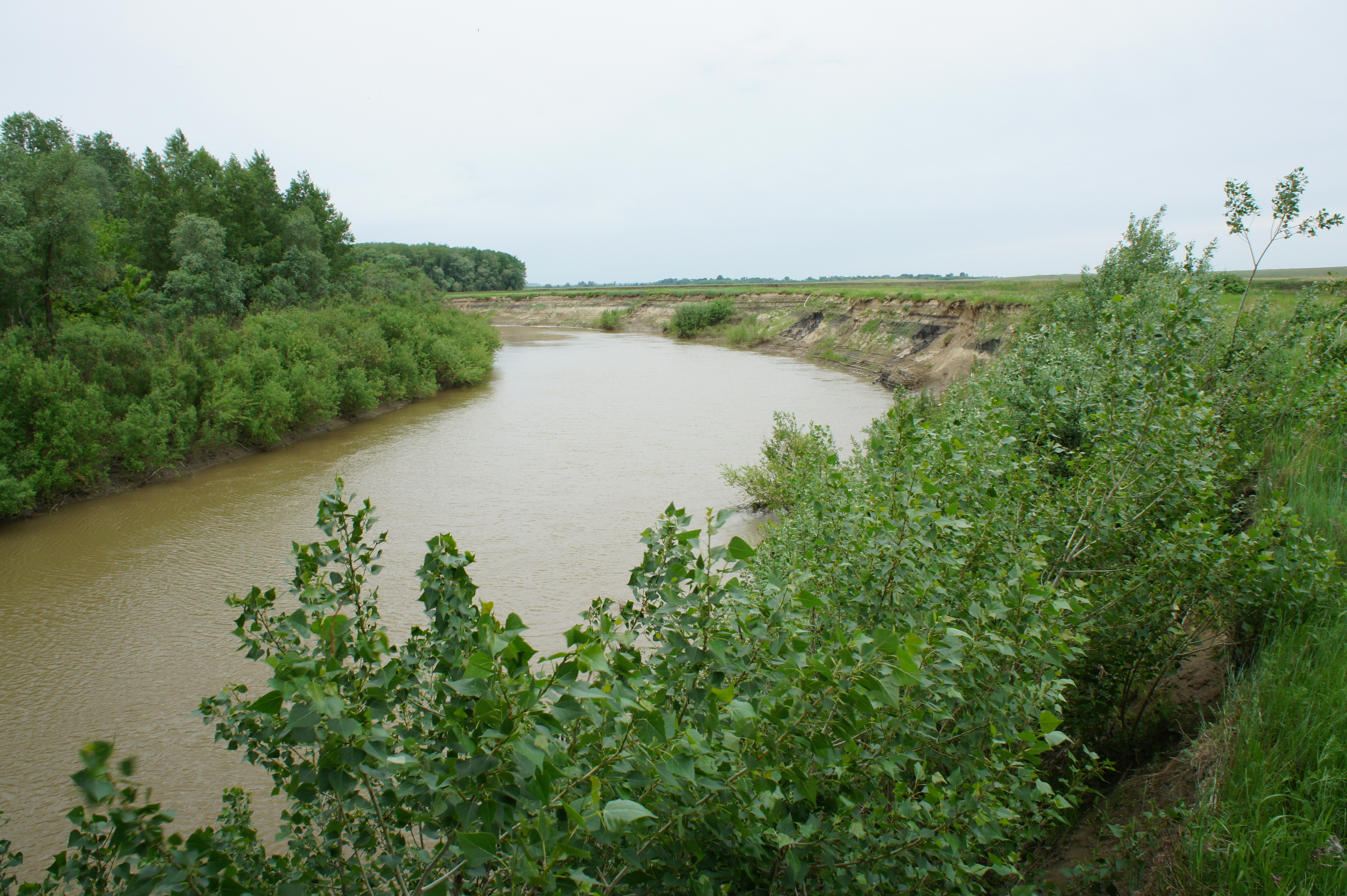 Алей в Алейском районе (окрестности с. Урюпино)